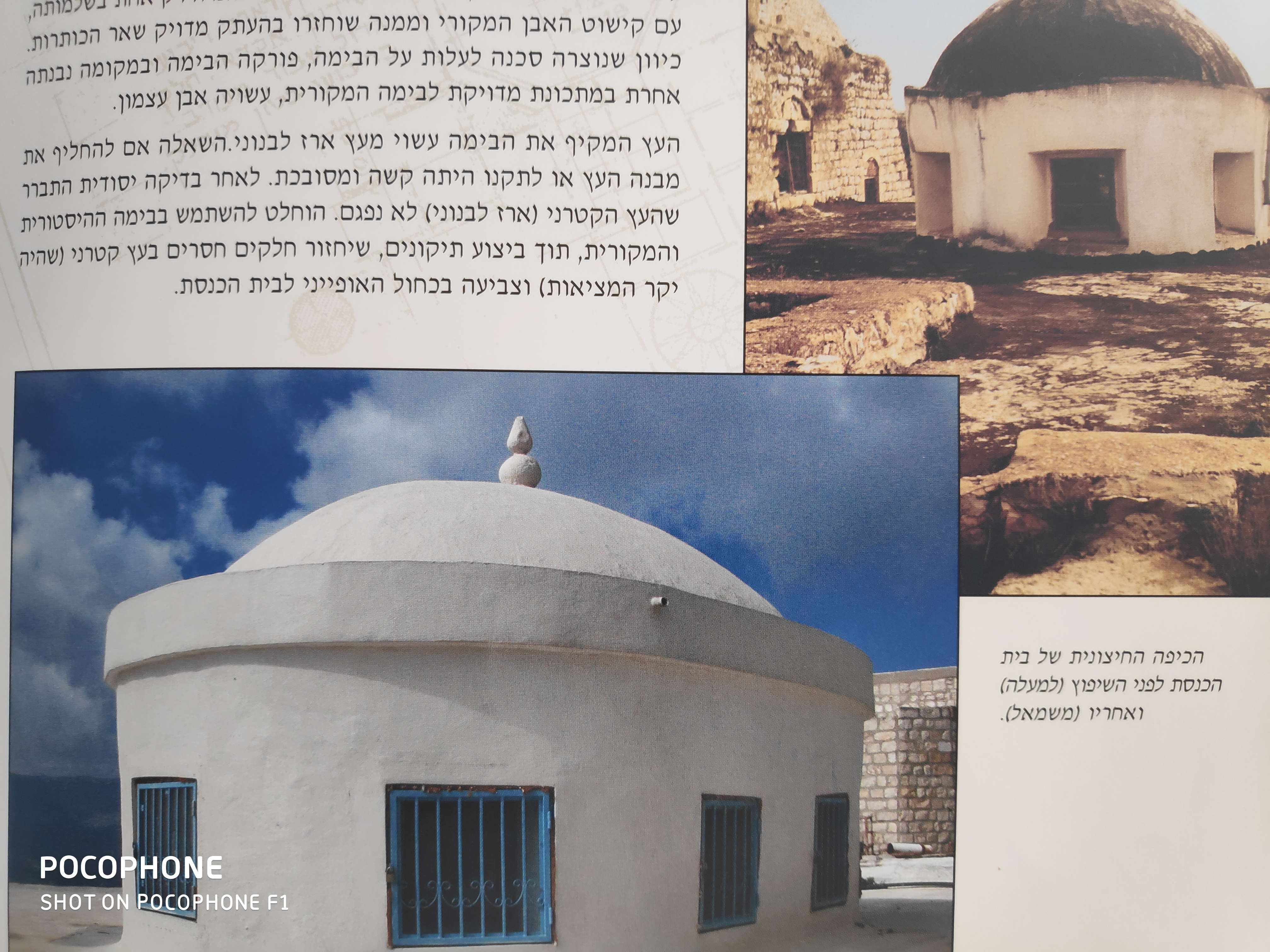 קטע מהספר על בית הכנסת אבוהב המתאר את שיפוץ בית הכנסת במאה ה-20